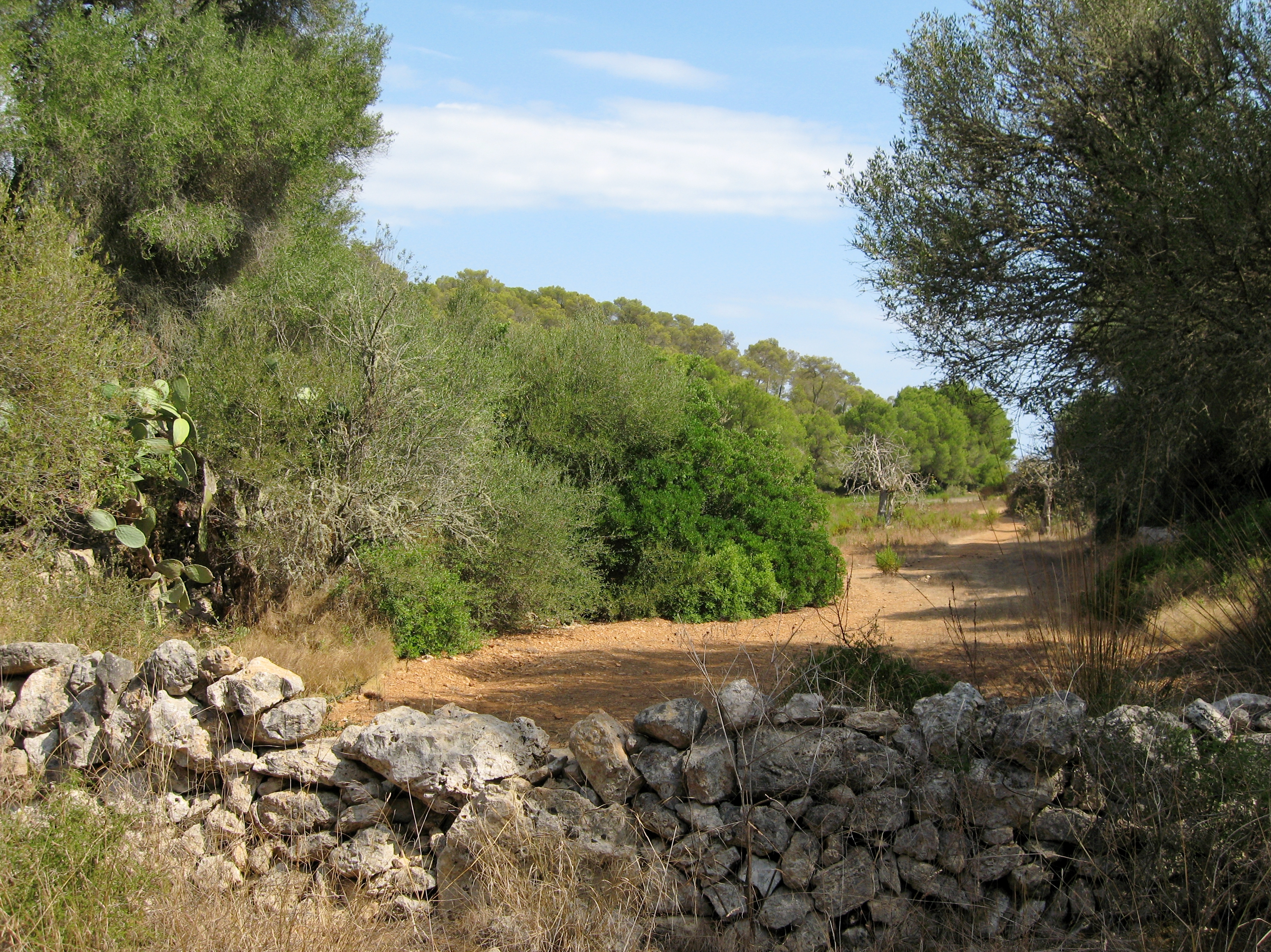 Landschaft im Parc natural de Mondragó hinter dem Strand s’Amarador, Gemeinde Santanyí, Mallorca, Spanien